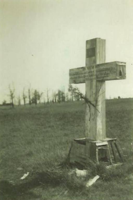 Première croix commérant les lourdes pertes canadiennes d'août 1944